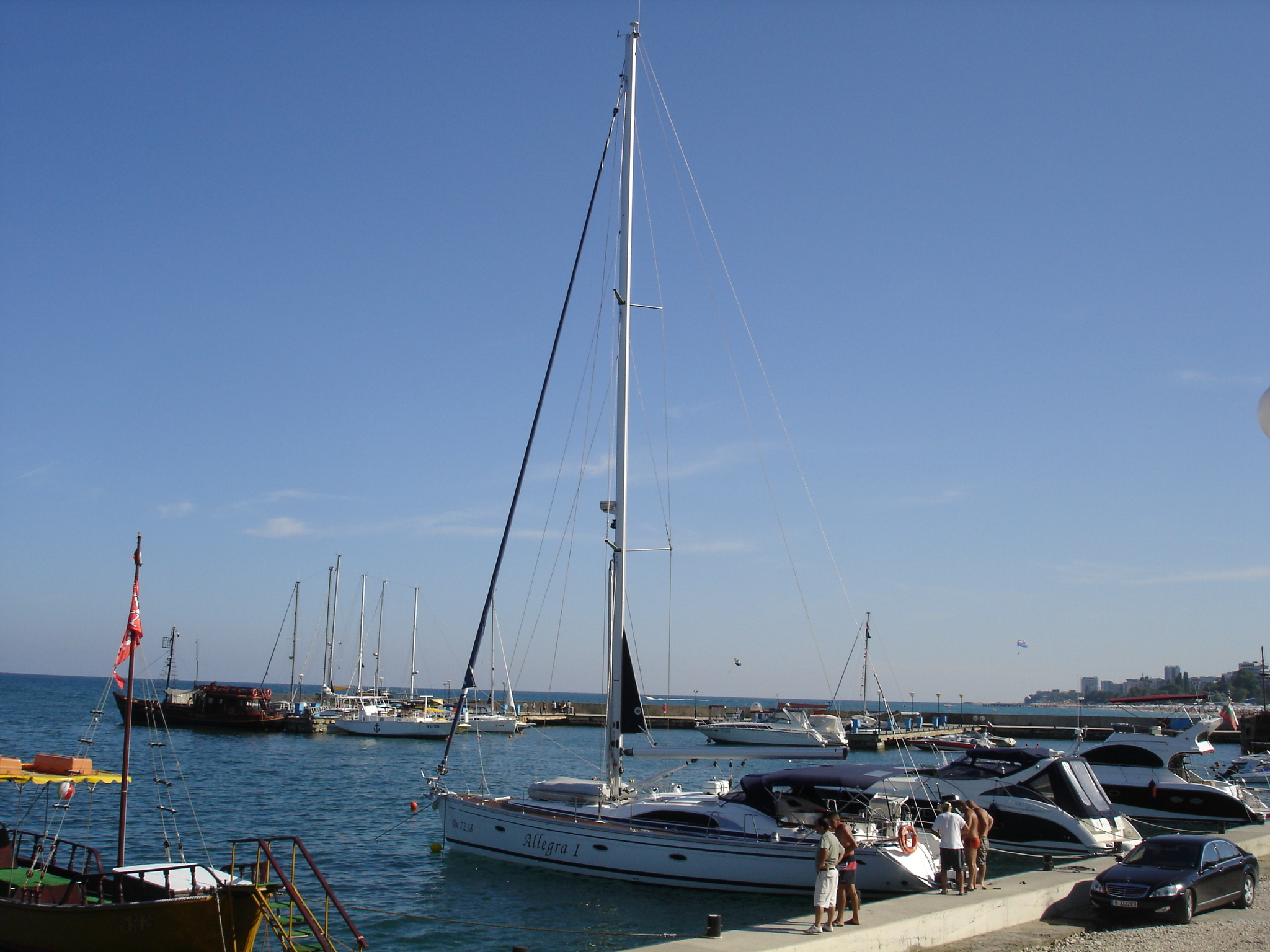 Yachtport Golden_Sands, Varna